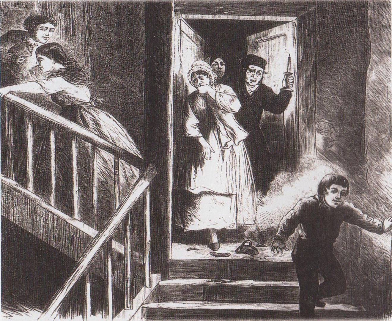 Разбивание горшка с пеплом на Средопостье в Польше